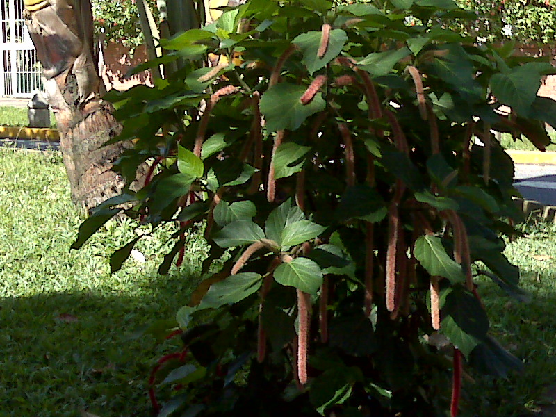 Amaranthus dubius en La Boyera (El Hatillo), estado Miranda - Venezuela (2012)